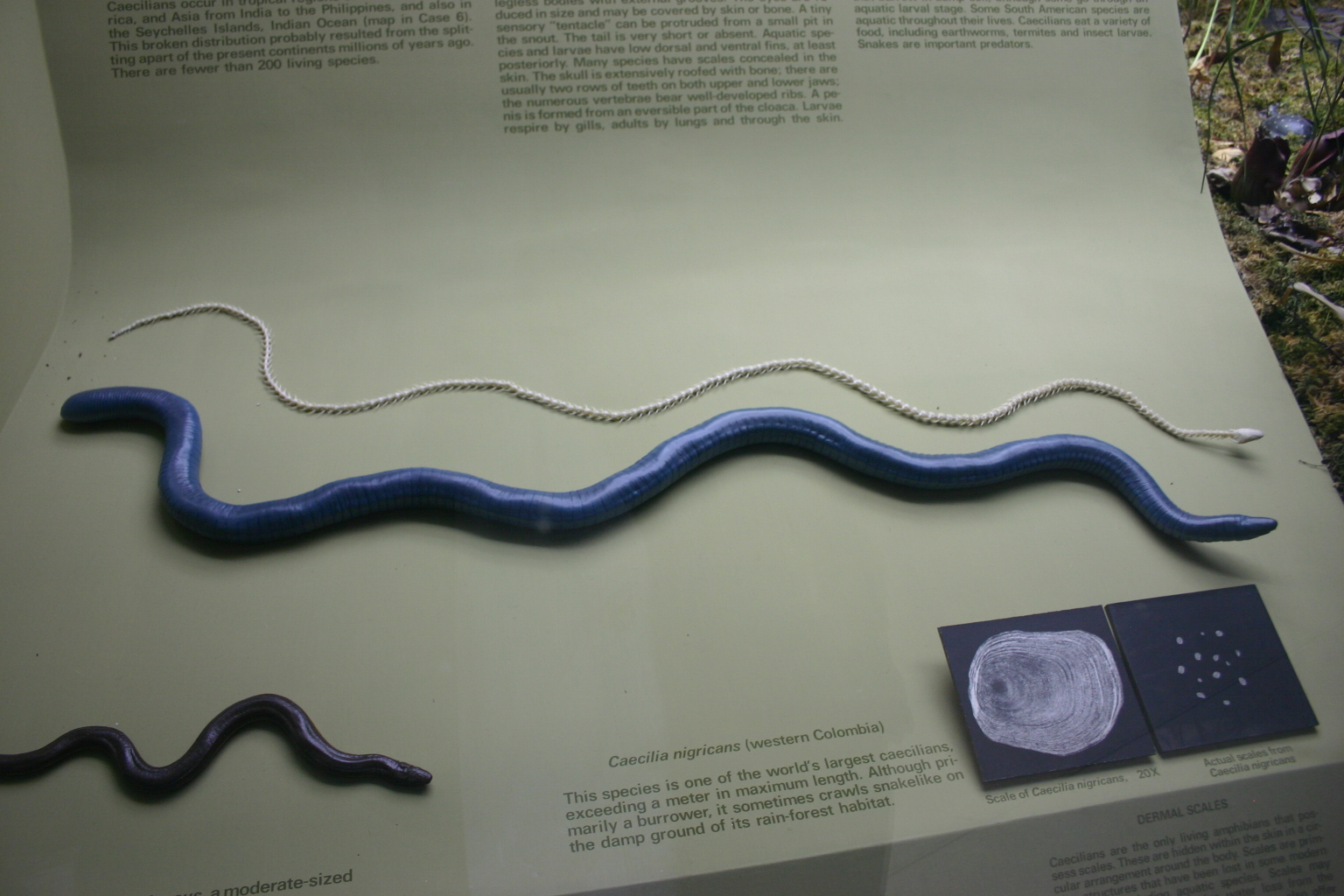 Caecilia nigricans